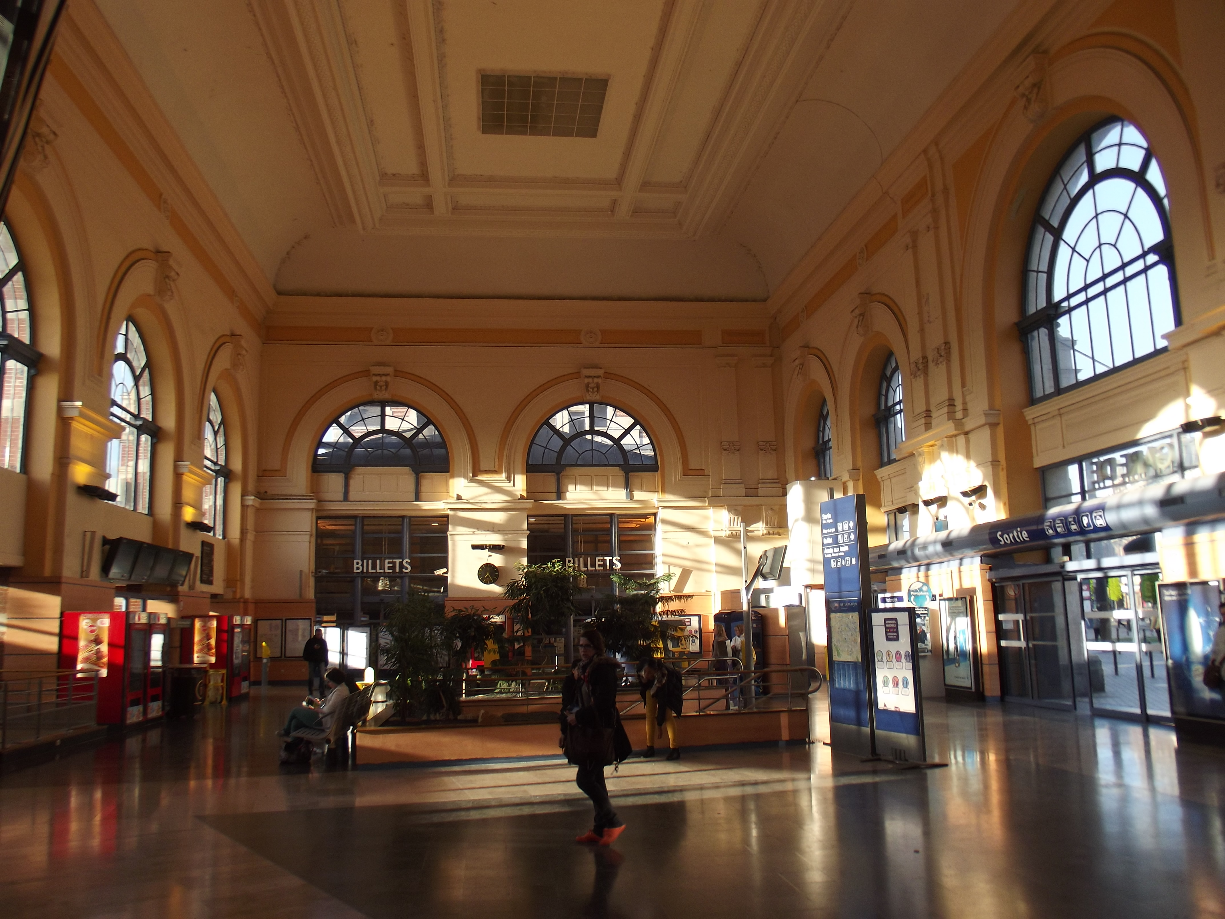 Hal van het station Valenciennes